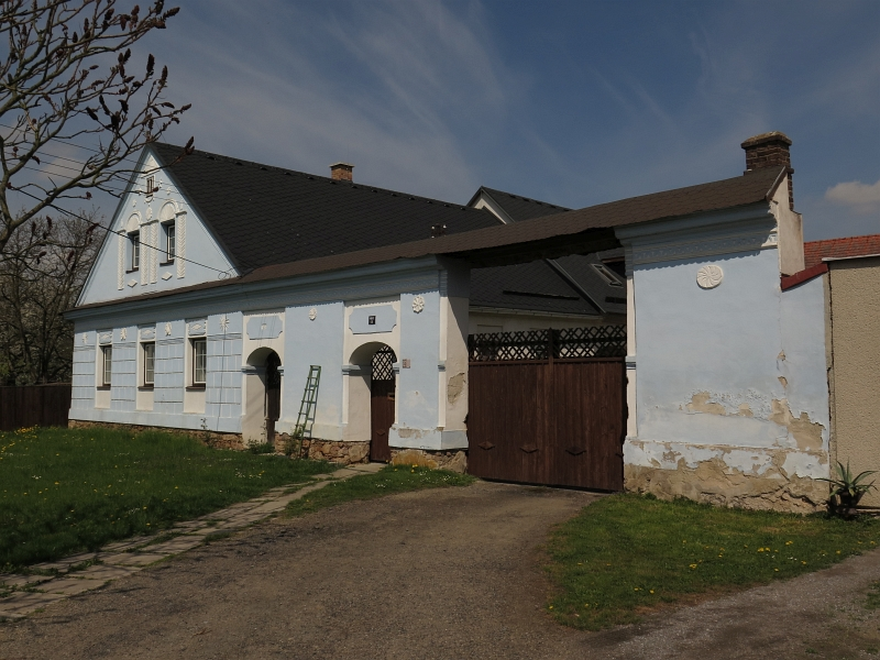 Usedlost čp. 53, Troubelice 53, Troubelice.